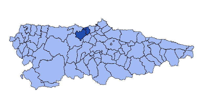 Concejos que forman la mancomunidad asturiana de las Cinco Villas